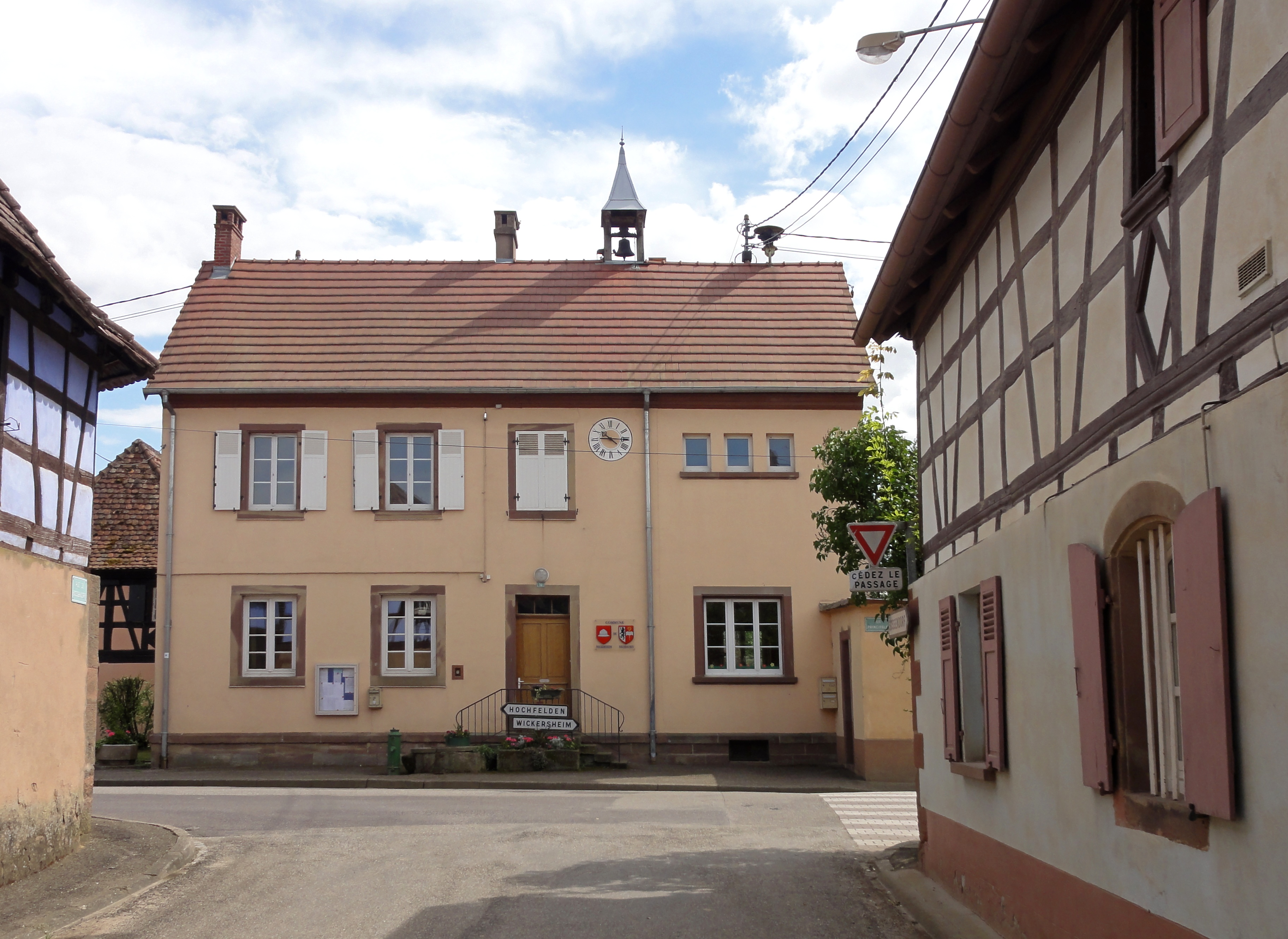 Alsace, Bas-Rhin, Wilshausen, Ancienne mairie-école.